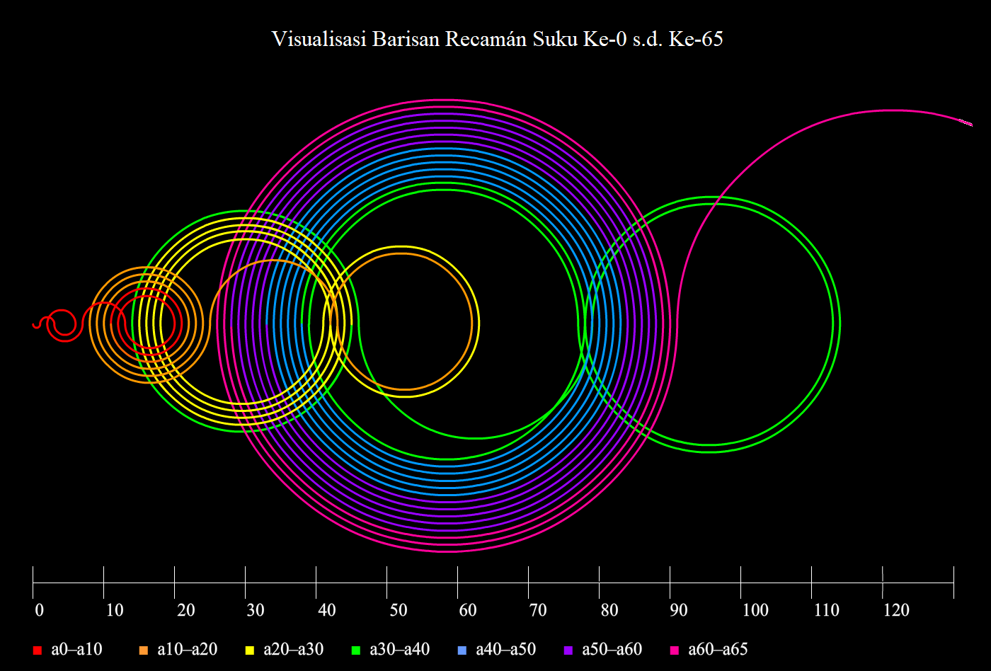 65 suku pertama dalam barisan Recamán divisualisasikan dengan lingkaran-lingkaran, serupa dengan metode pada video Numberphile, "The Slightly Spooky Recamán Sequence"